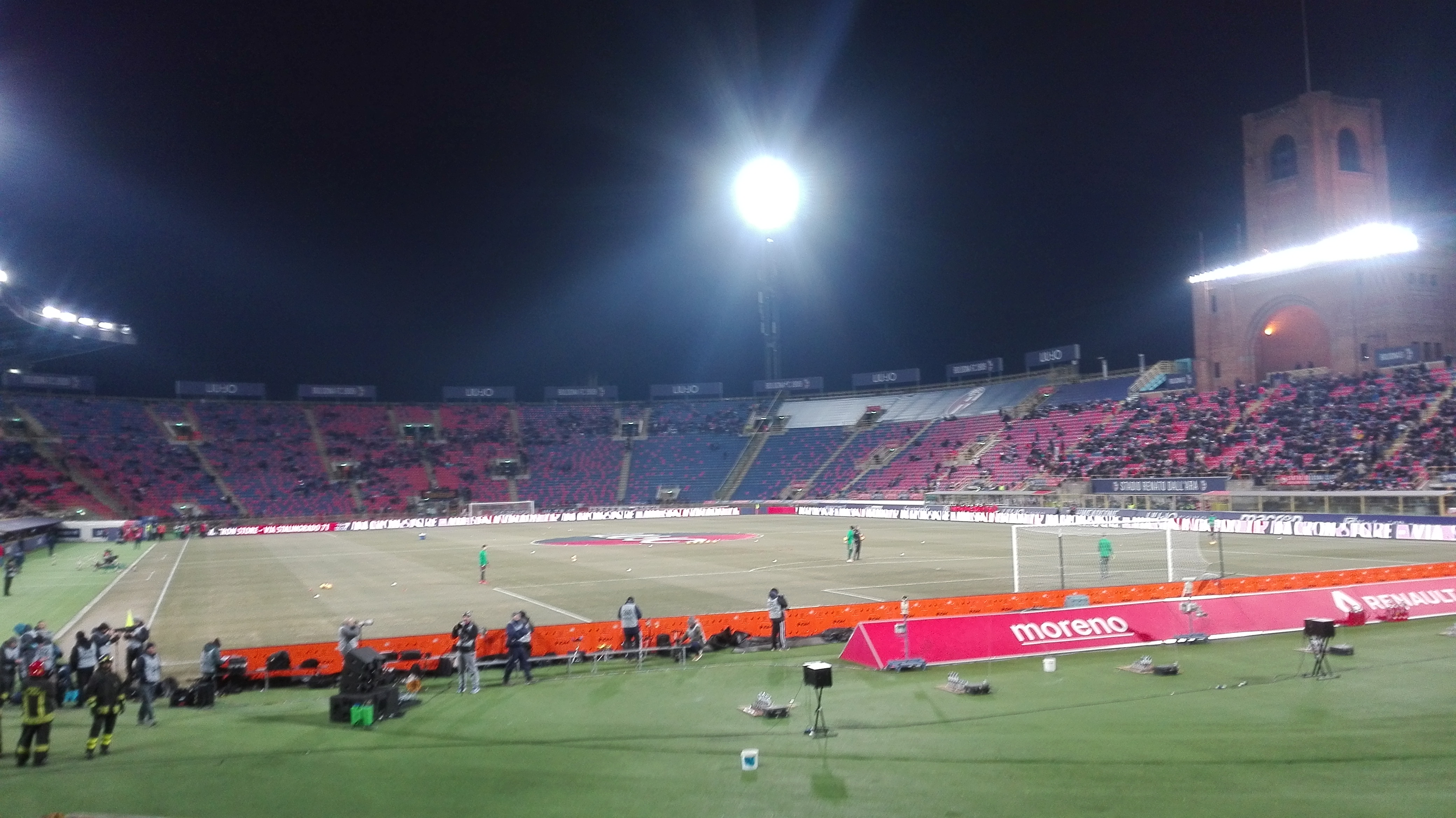 Panoramica notturna dello Stadio Renato Dall'Ara